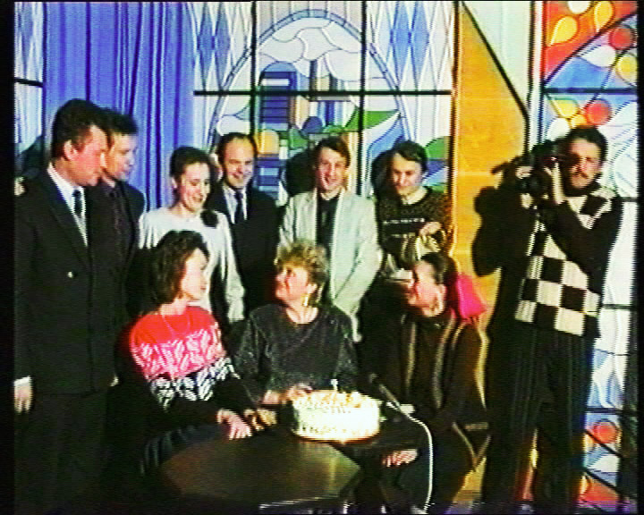 ТВО “Телебачення” вже 1 рік!